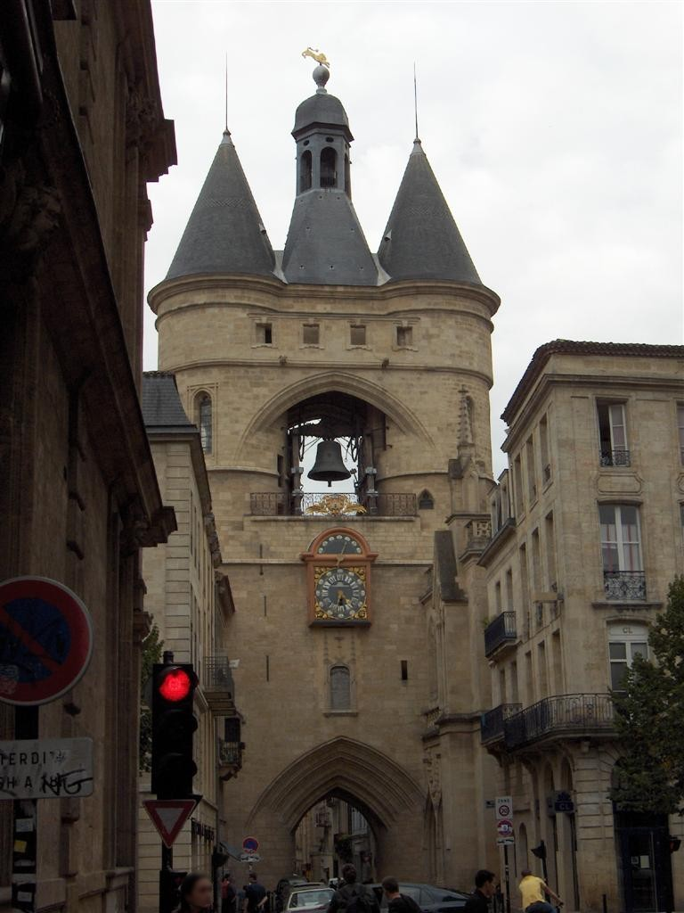 La Grosse Cloche (Bordeaux) Photo prise le 15/10/2005